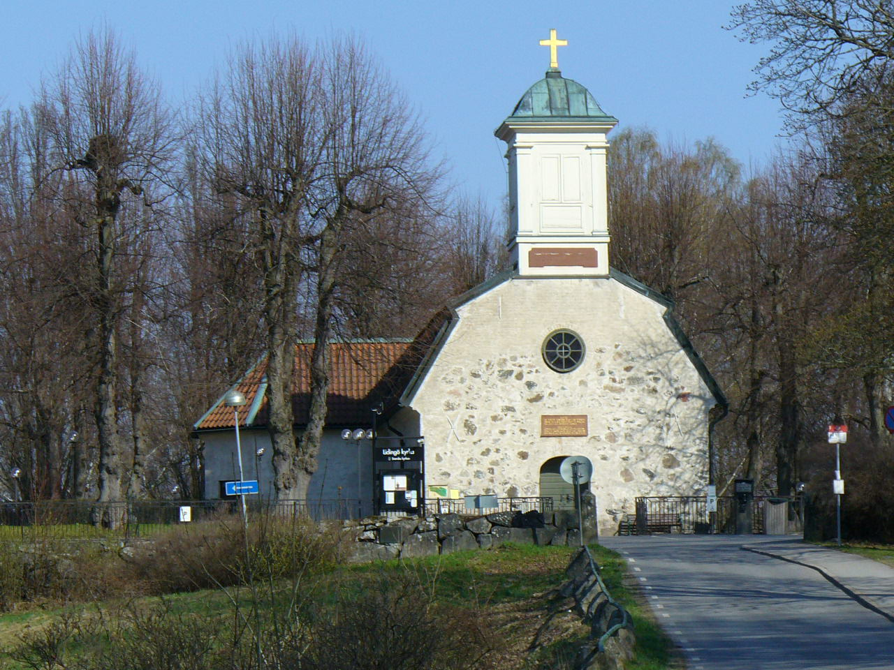 Lidingö church, Lidingö, Sweden.